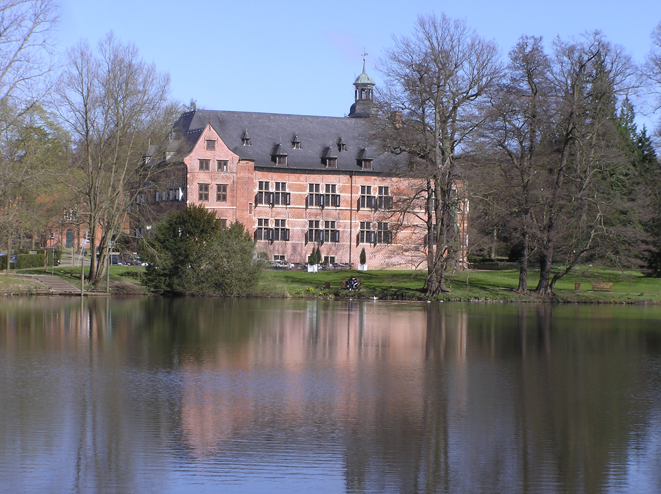 Schloss Reinbek am Mühlenteich